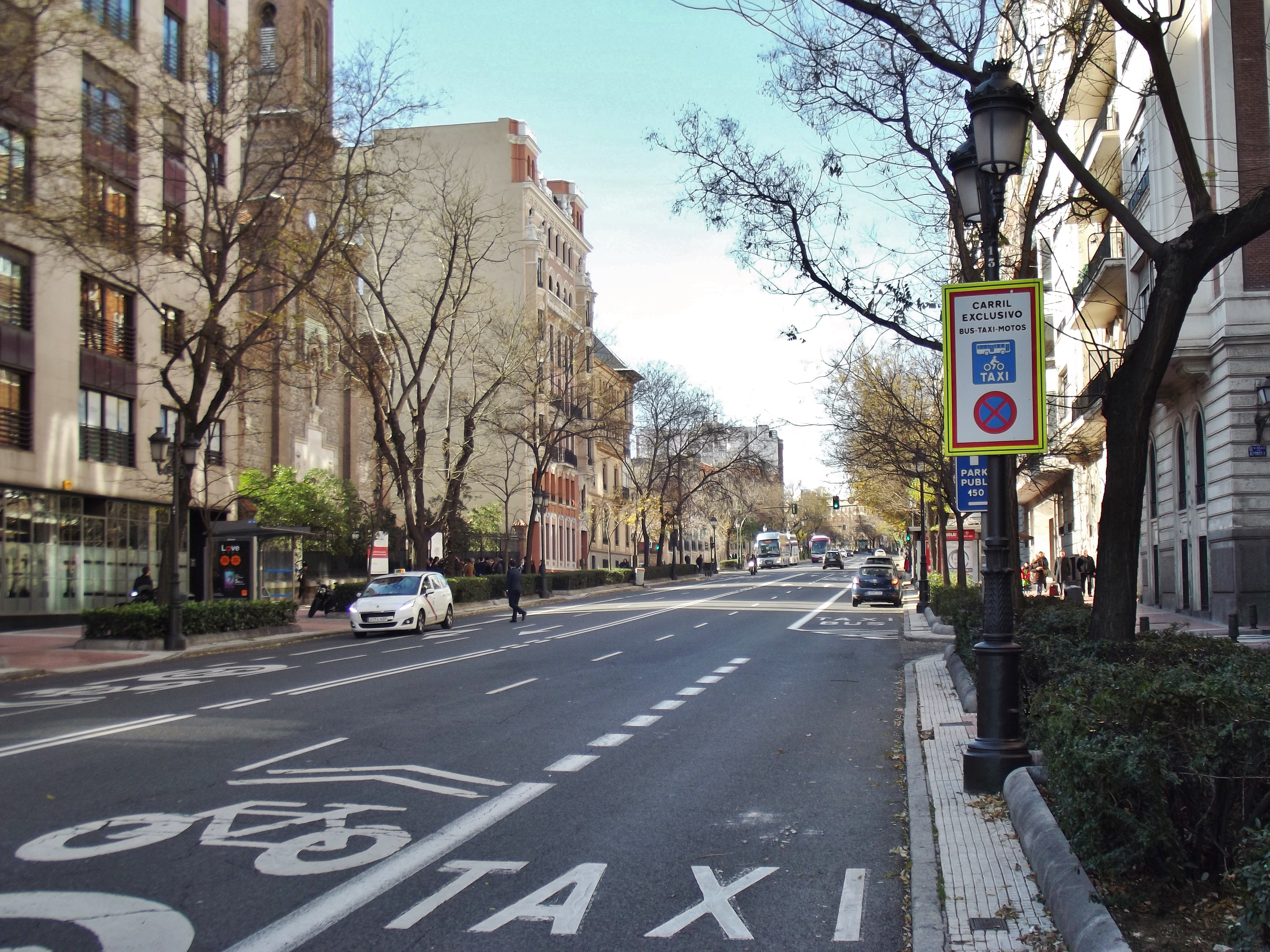 Paseo de Eduardo DAto, Madrid